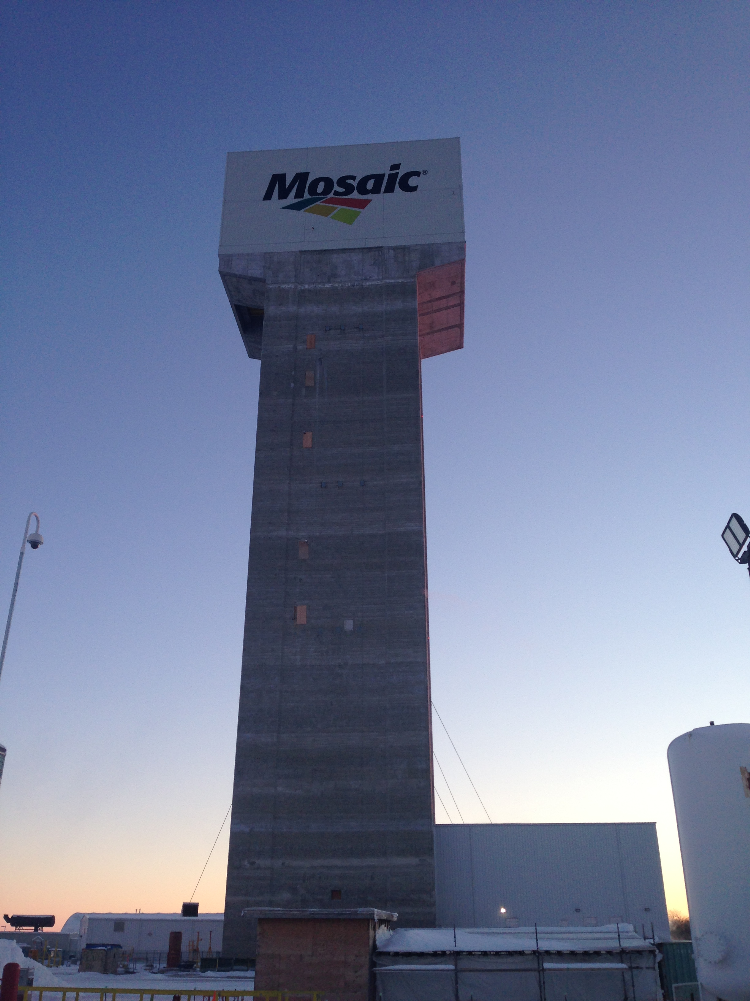 North shaft Headframe at K3 Mine. Esterhazy, Saskatchewan.